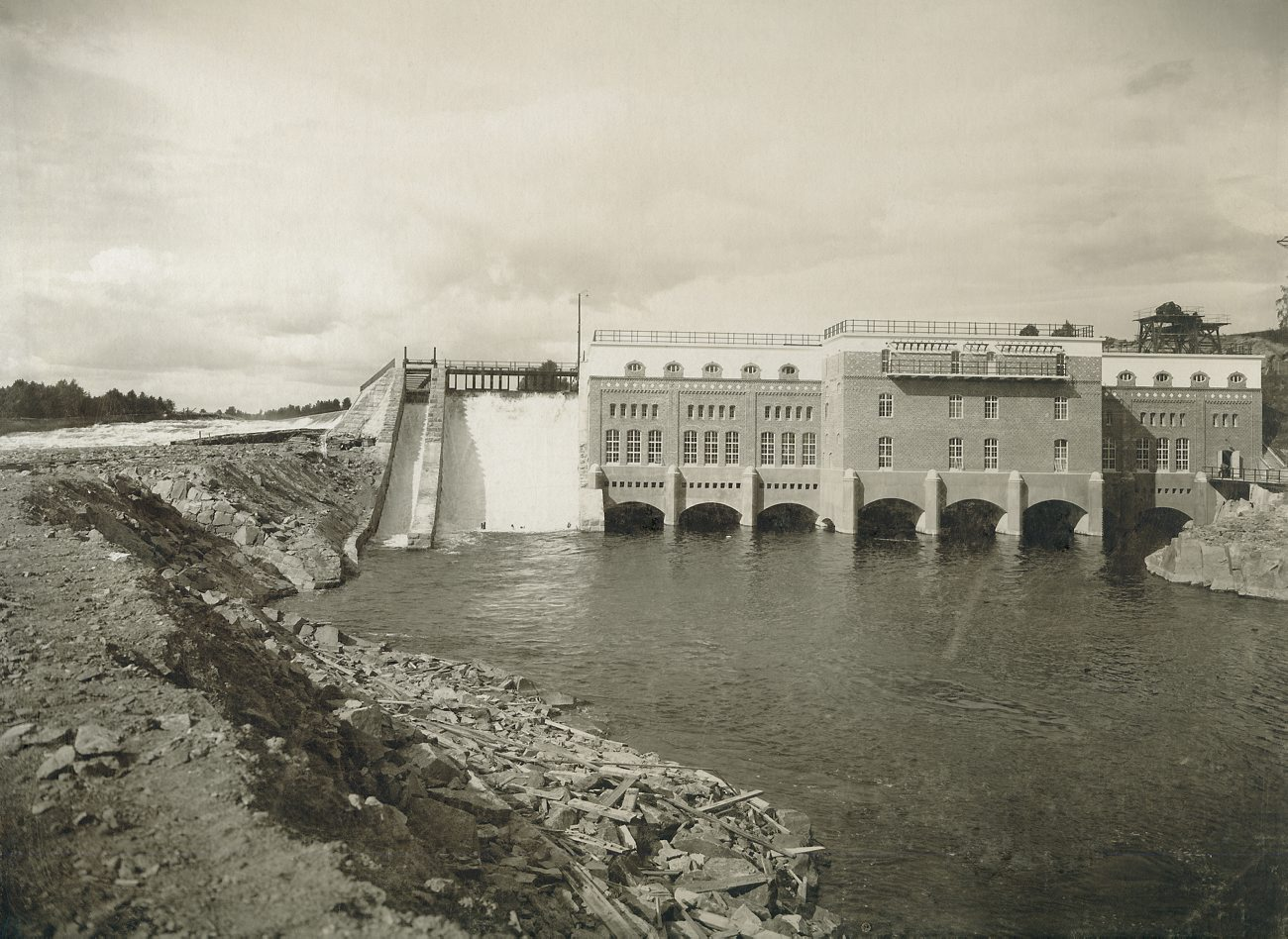 DIG3357. Forshults Kraftstation. Fotografiet är skänkt till Tekniska museet från Svenska Turistföreningen.